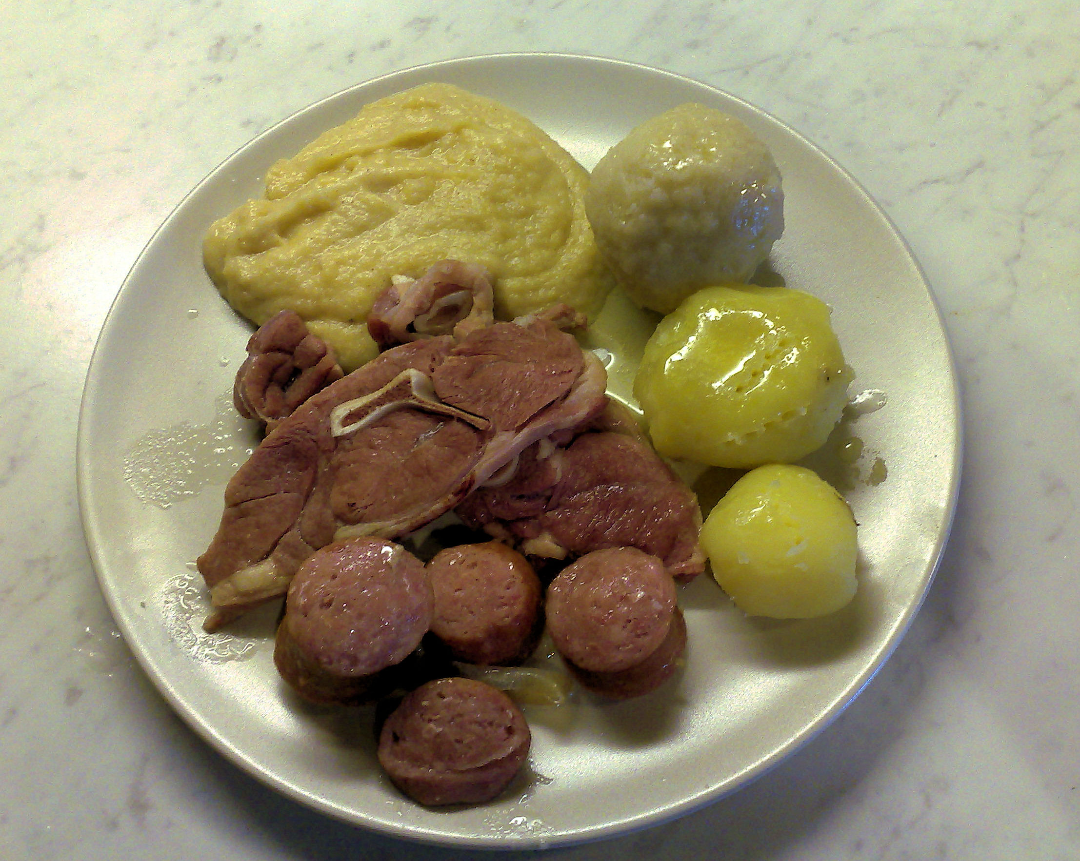 Komlemiddag med salt kjøtt av lam, vossakorv, kålrabistappe, poteter og komle